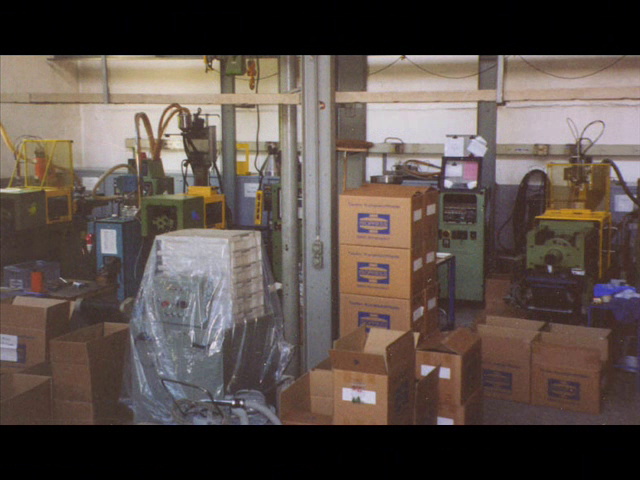 Spritzerei isopress.